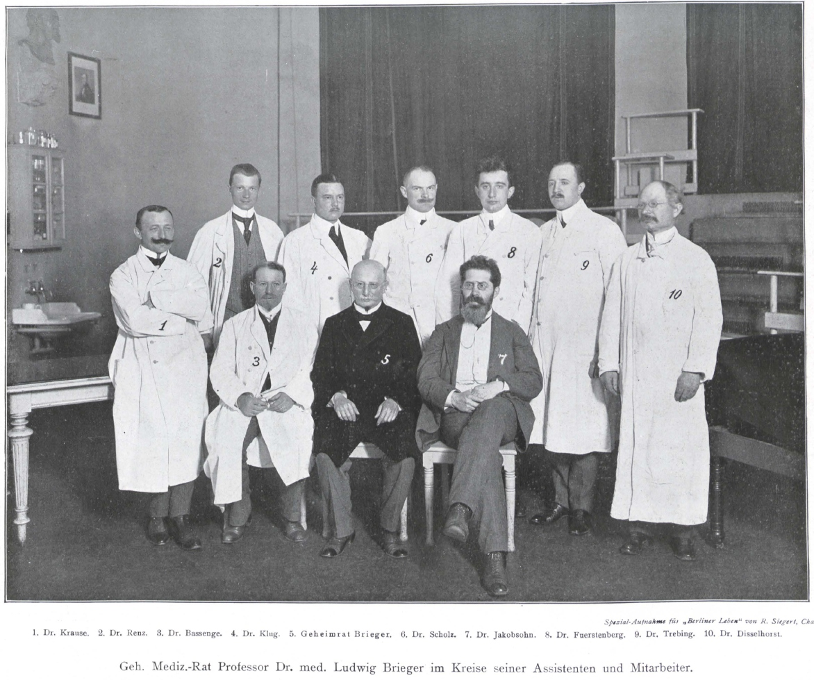 Ludwig Brieger (1849-1919), Professor für Medizin an der Humboldt-Universität zu Berlin, im Kreis seiner Assistenten und Mitarbeiter.